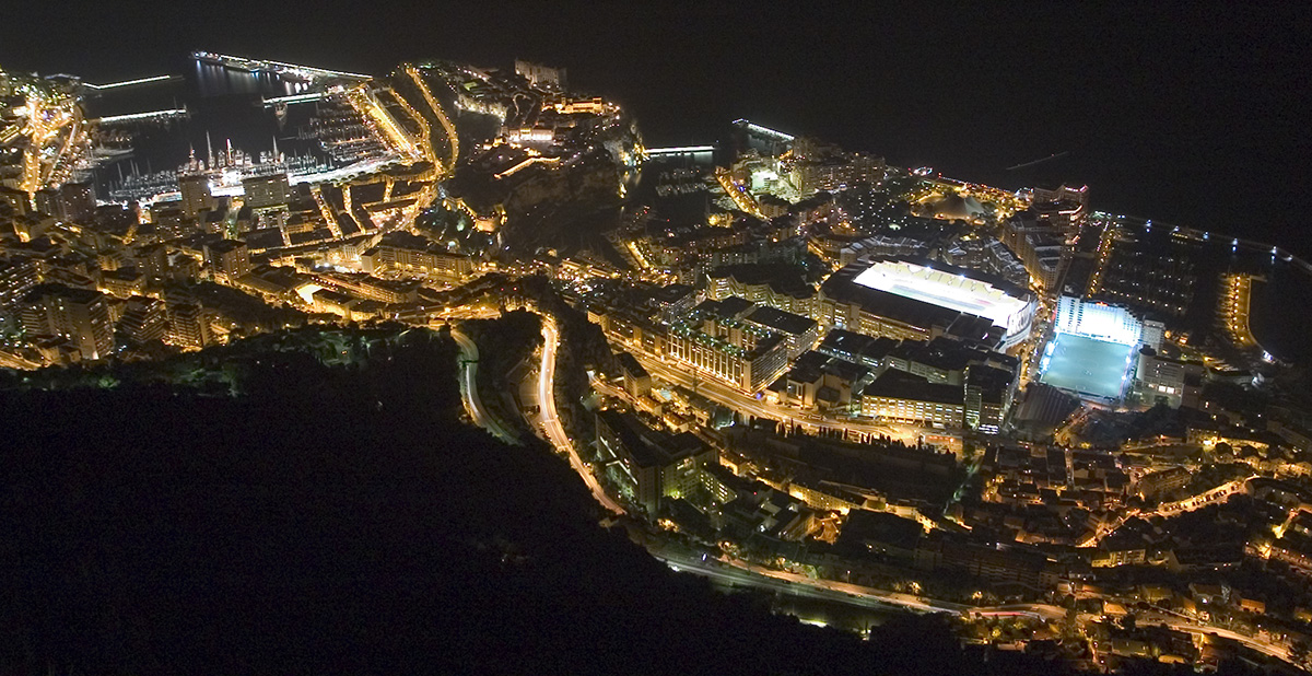 Nächtlicher Blick auf die Bucht von Monaco (südwestlicher Teil)